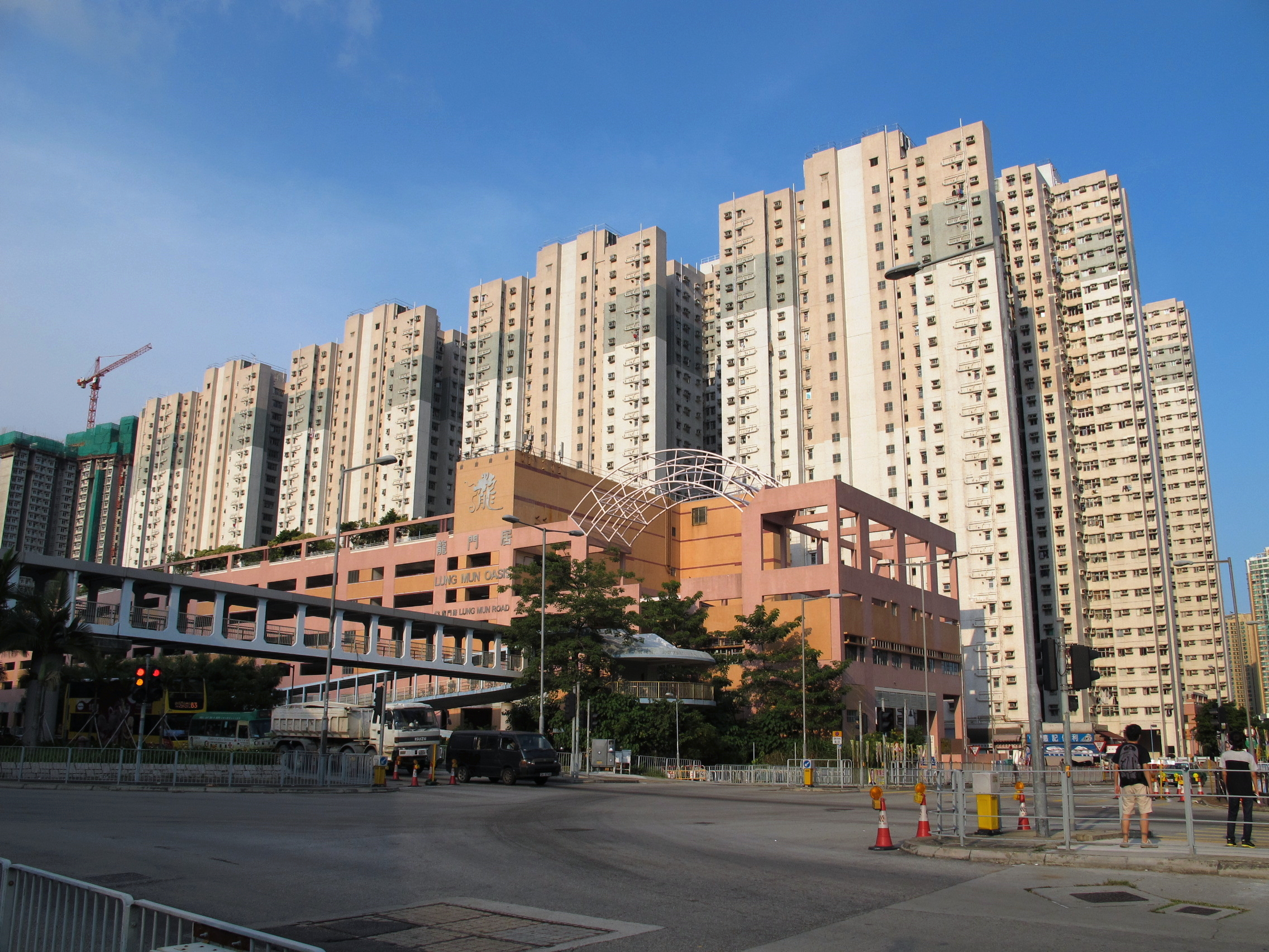 Lung Mun Oasis 龍門居